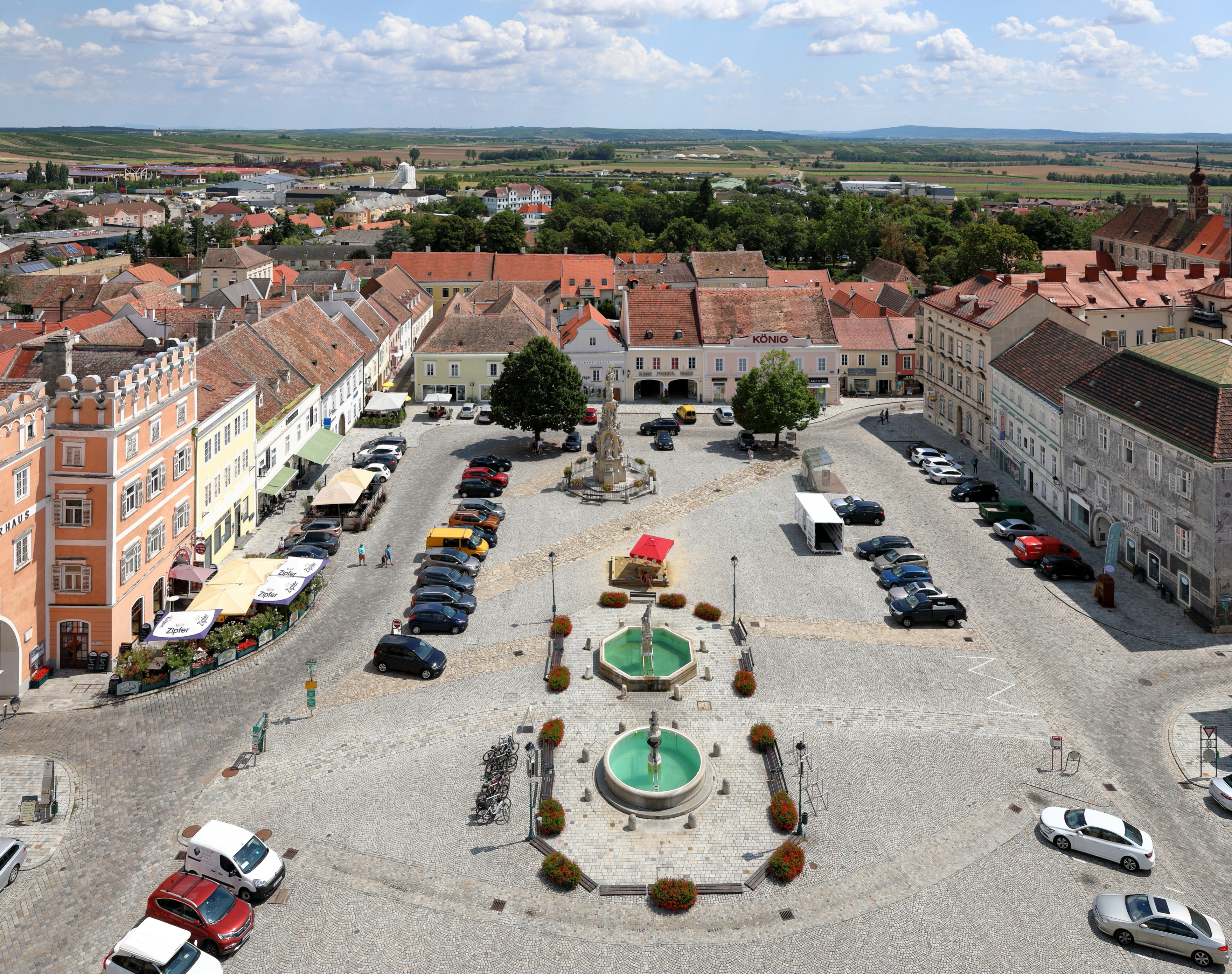 Blick vom Rathausturm über den Hauptplatz in Richtung Osten in der niederösterreichischen Stadtgemeinde Retz.